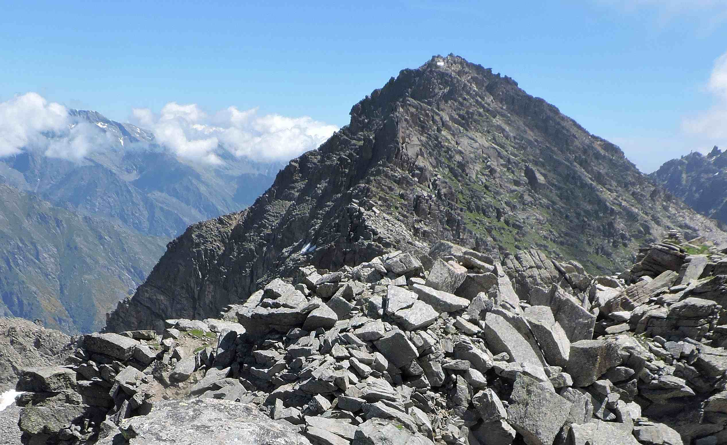 Il monte Unghiasse (Alpi Graie) visto dalla da cresta est del monte Bellagarda